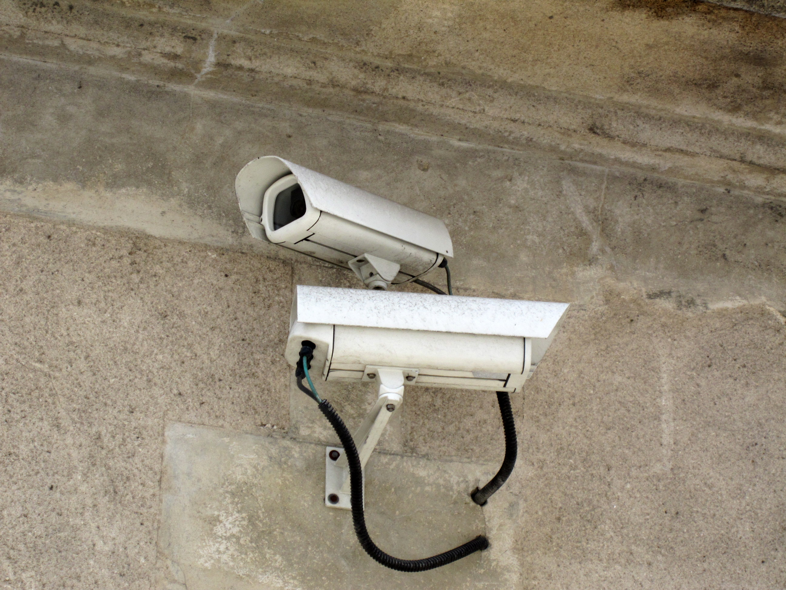 Caméras de surveillance sur la voie publique à Cognac (France)